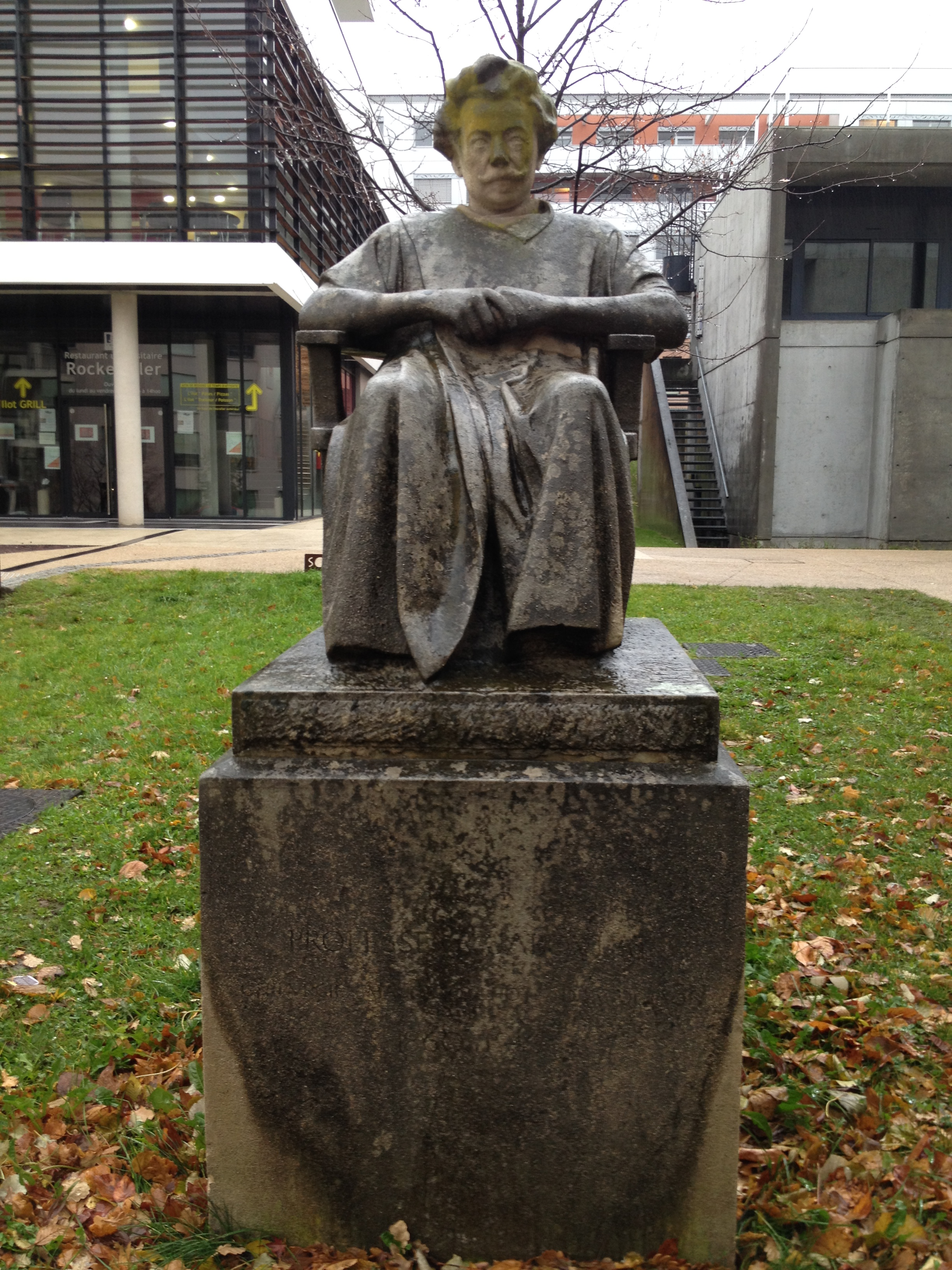 Statue de Mathieu Jaboulay : faculté de médecine de Lyon (domaine Rockefeller).